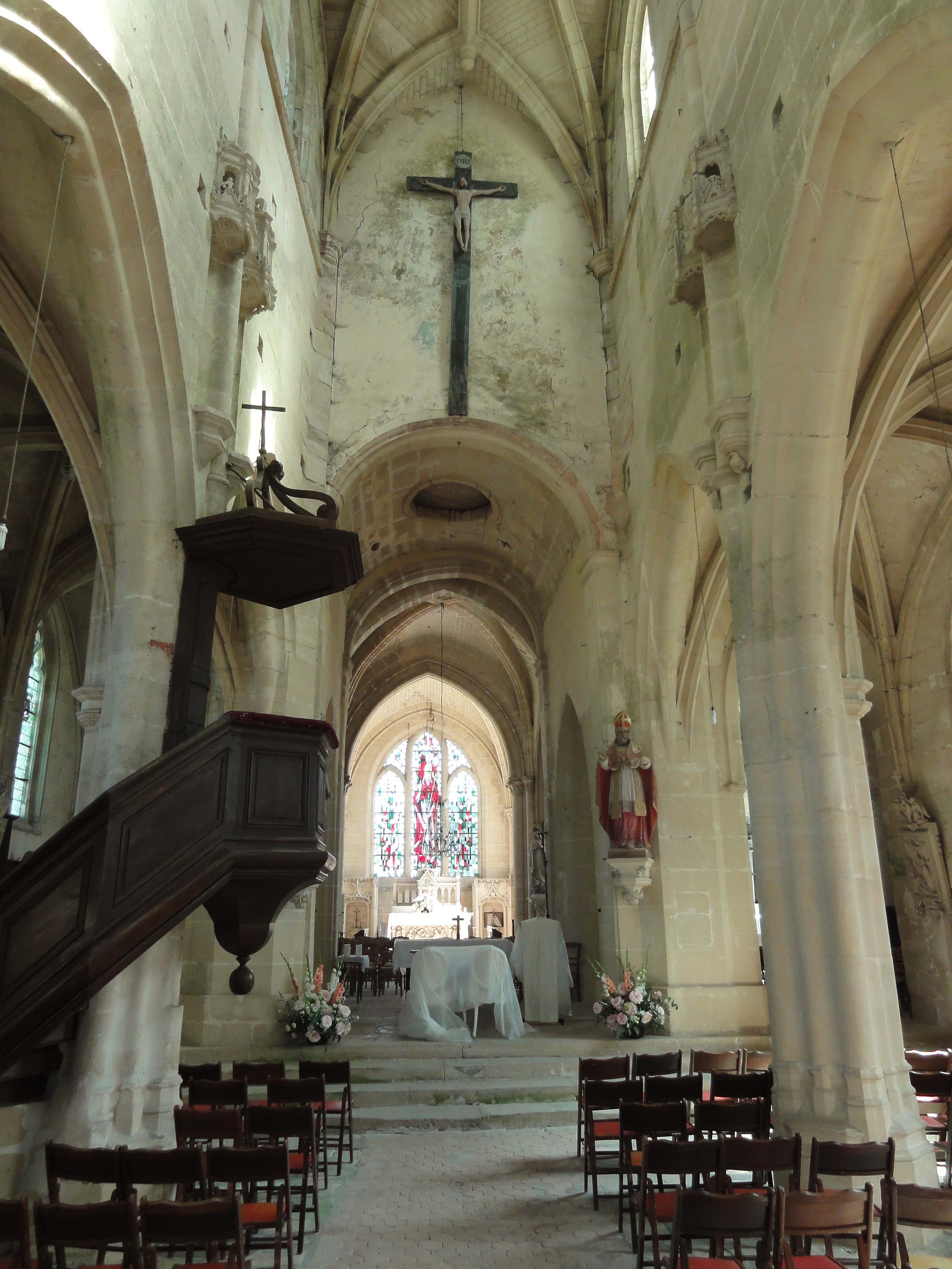 Intérieur de l'église - voir titre.